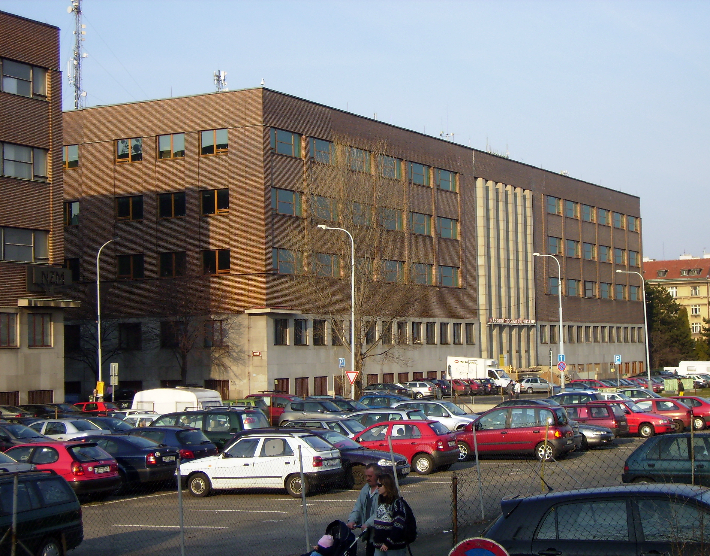 Národní technické muzeum v Praze